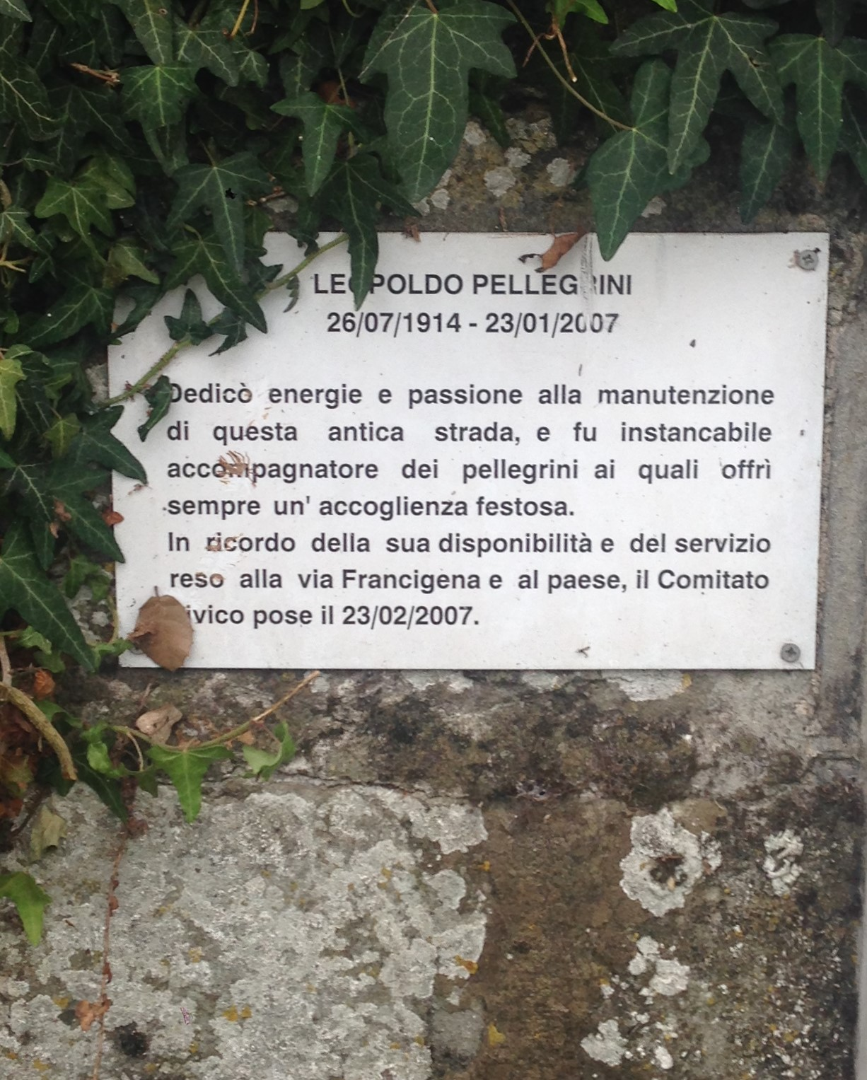 Placa conmemorativa junto a la Vía Francígena entre Altopascio y San Miniato